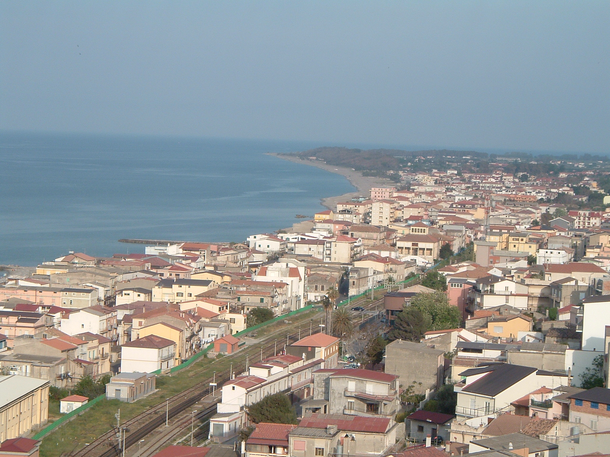 Scattata da Ippolito Leonardo (Utente:Vortix); macchina digitale propria; GFDL